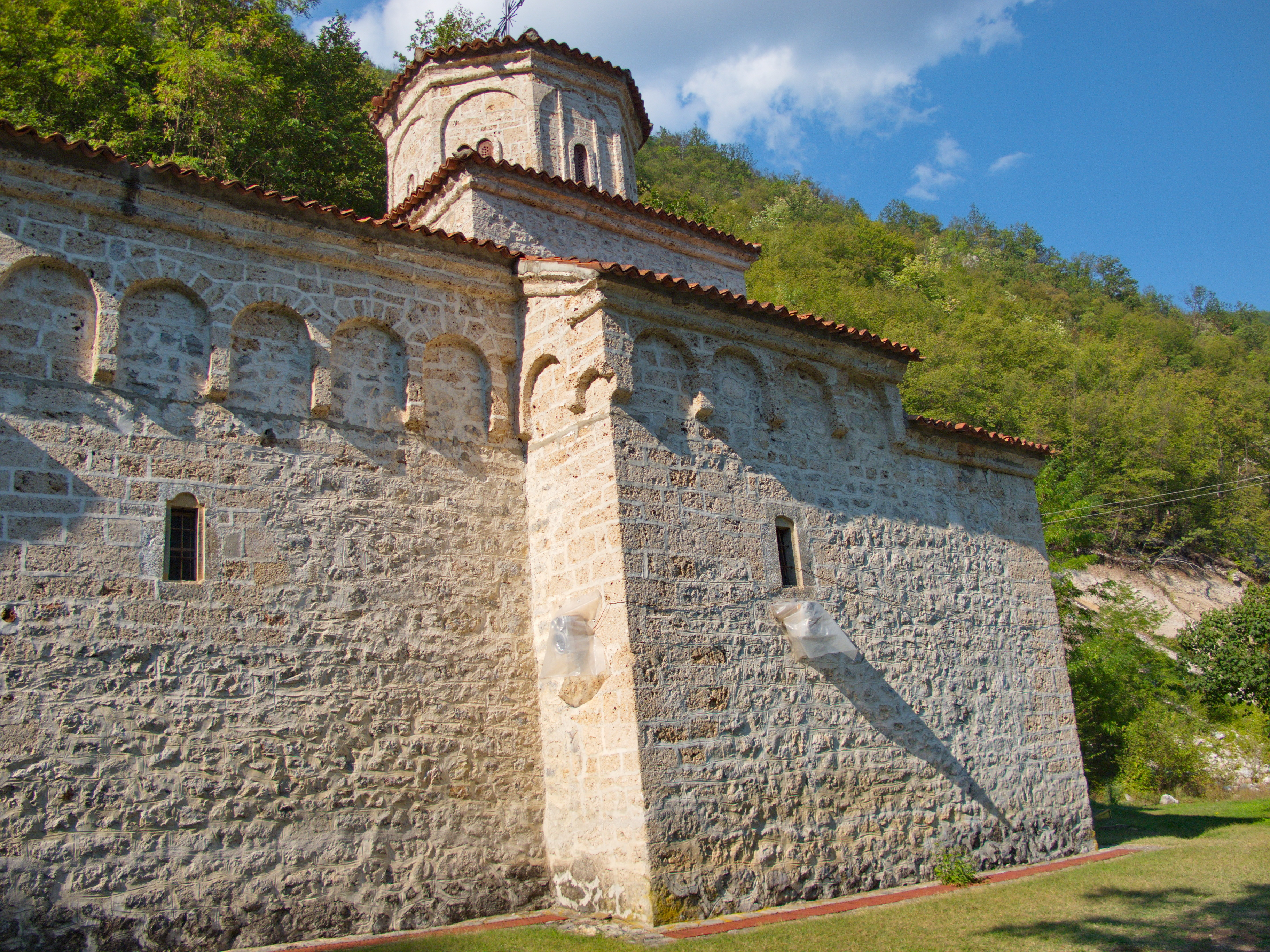 Манастир Клисура, јужни зид.